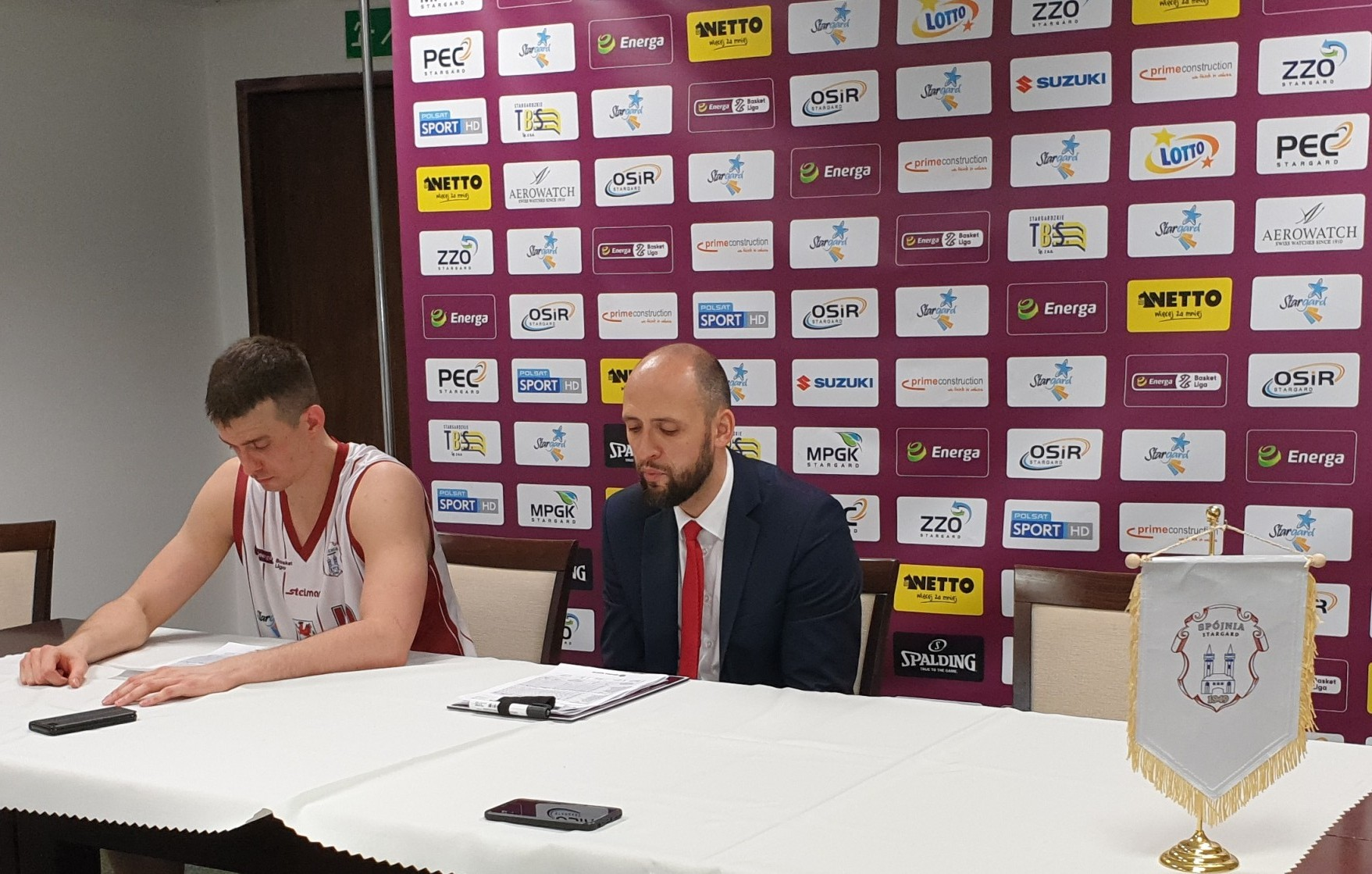 Konferencja prasowa Stargard